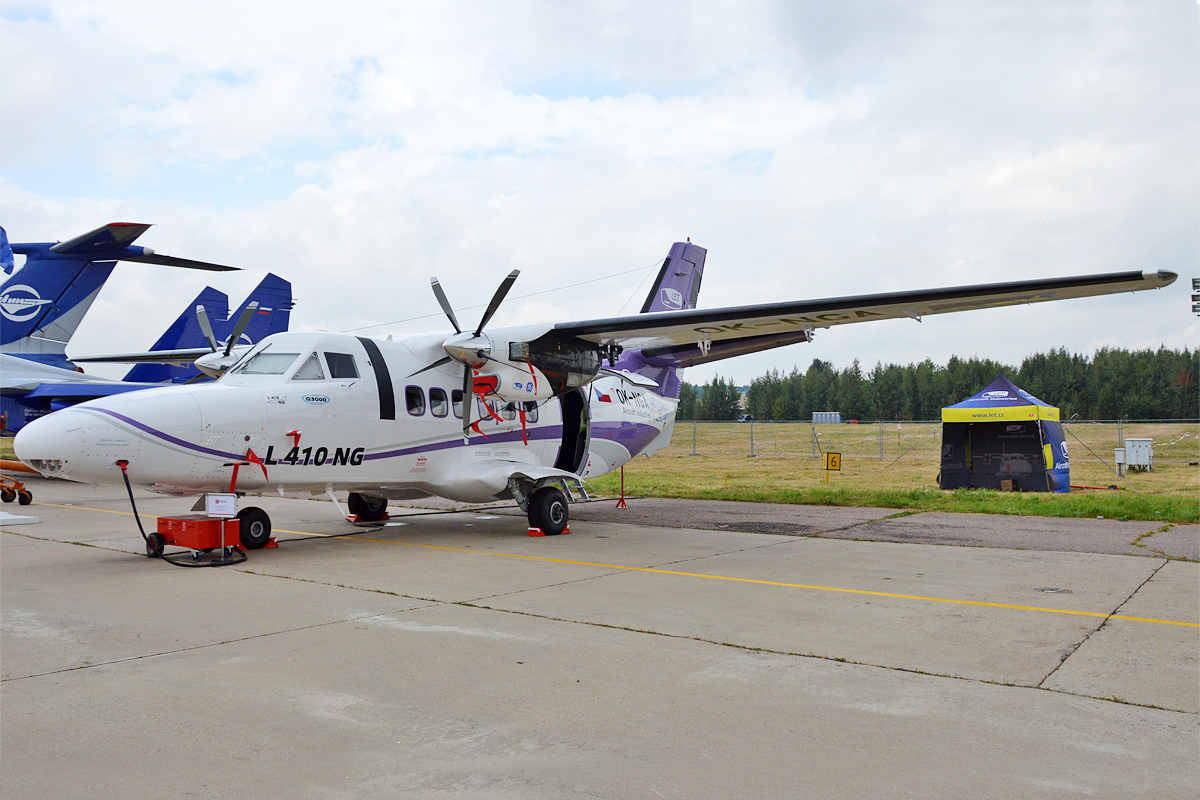 LET, OK-NGA, L-410NG